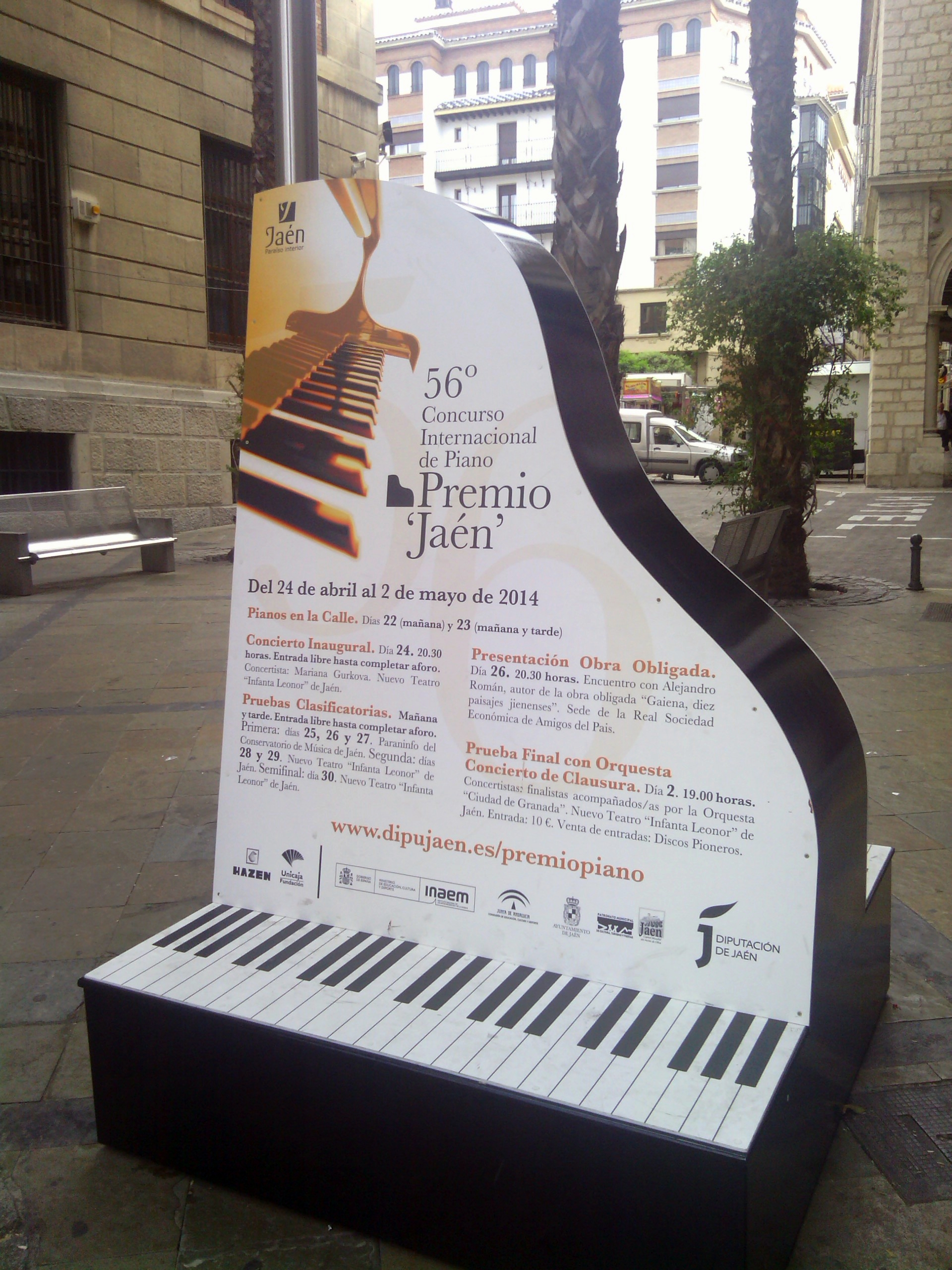 Anuncio del 56º Premio Jaén de Piano, de Jaén.